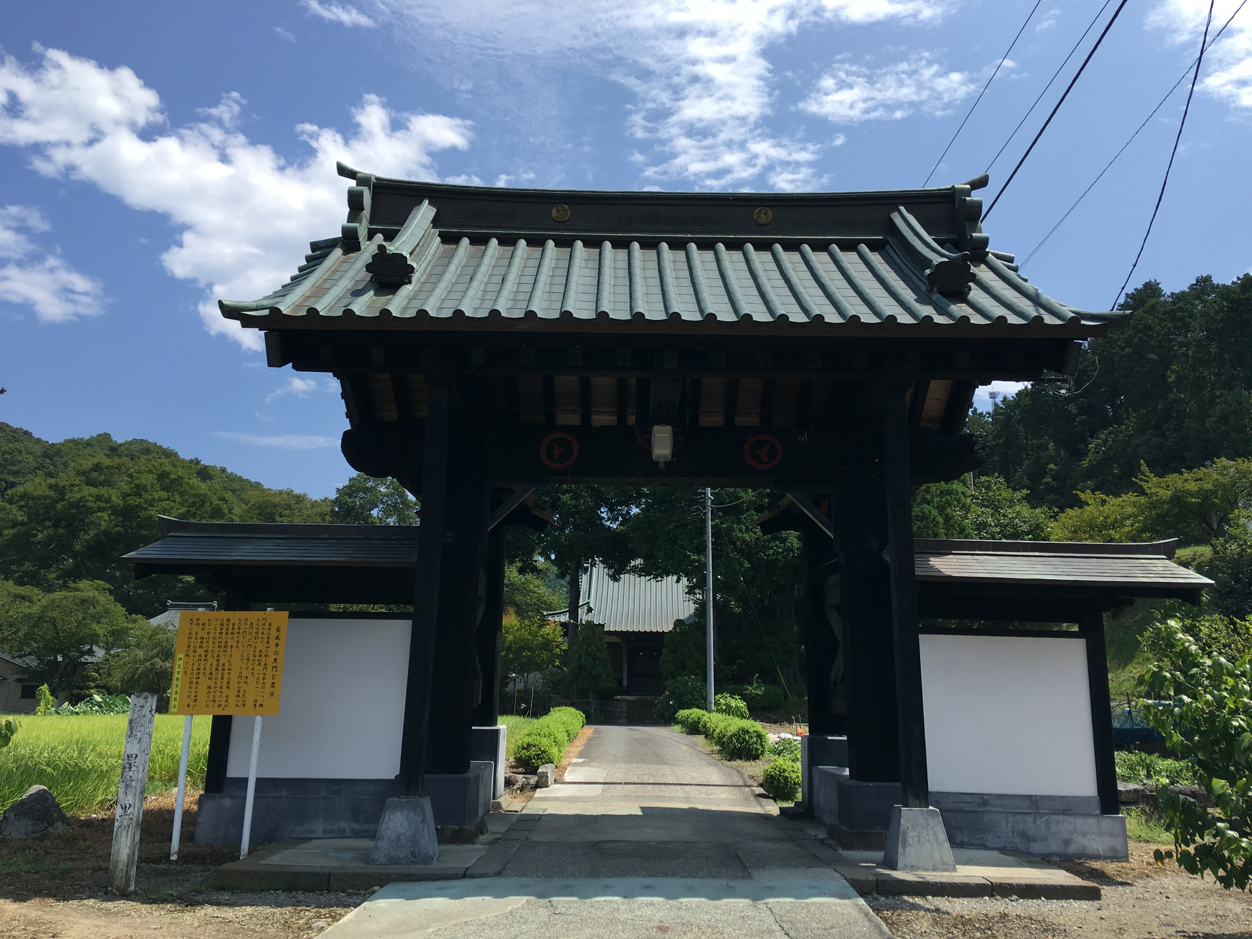 東光山 實成寺（実成寺） 黒門